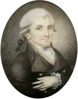 Беларуская (тарашкевіца): Партрэт Яўхіма Храптовіча (Jaŭchim Chraptovič)